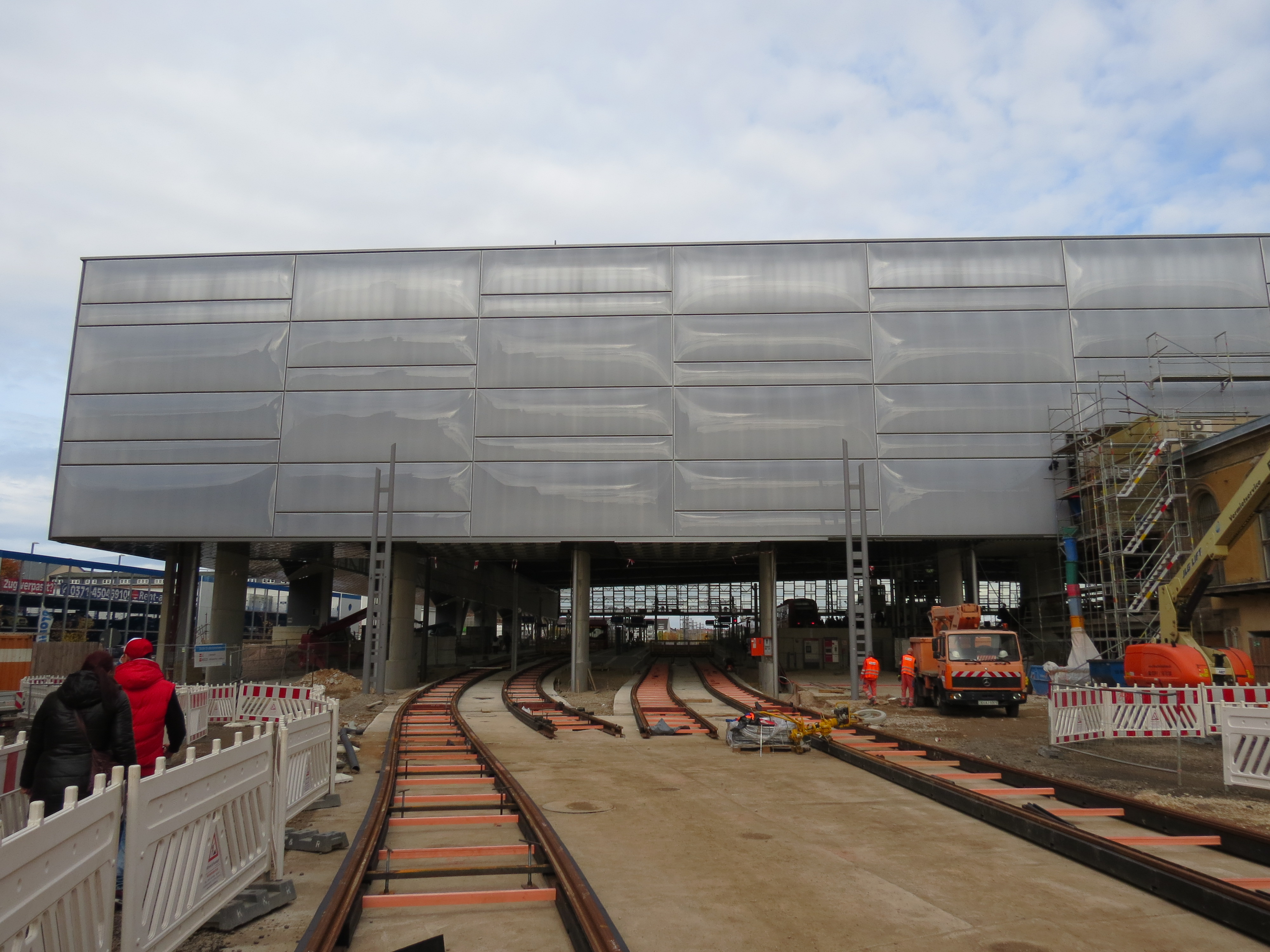 Umbau des Chemnitzer Hauptbahnhofs für das Chemnitzer Modell, damit in Zukunft Straßenbahnen ohne Umstieg als Züge weiter verkehren können